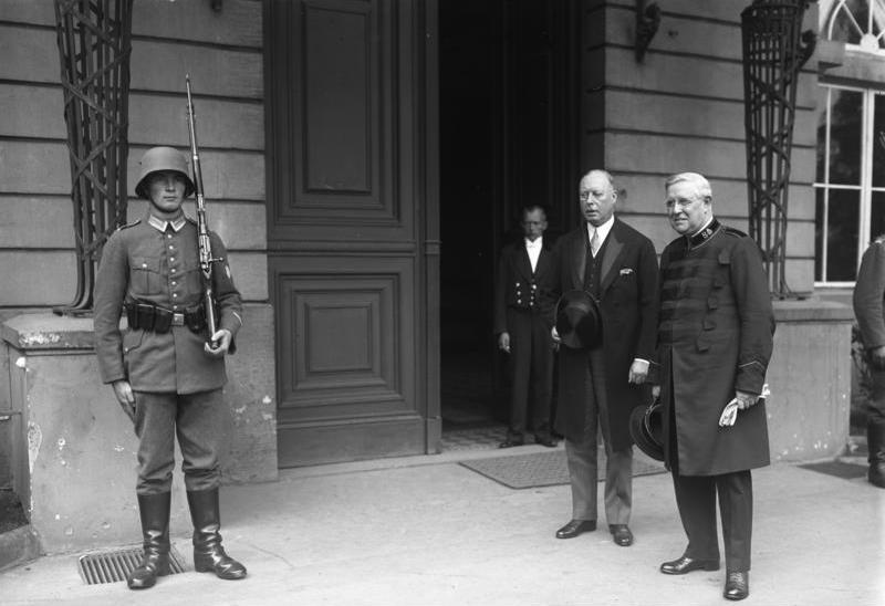 Der General der Heilsarmee Higgins, welcher mit der deutschen Heilsarmee Massnahmen zur Linderung der Not vorbereitet, wurde vom Reichspräsidenten empfangen! General Higgins, (rechts) mit dem englischen Botschafter Sir Horace Rumbold, nach dem Besuch beim Reichspräsidenten.